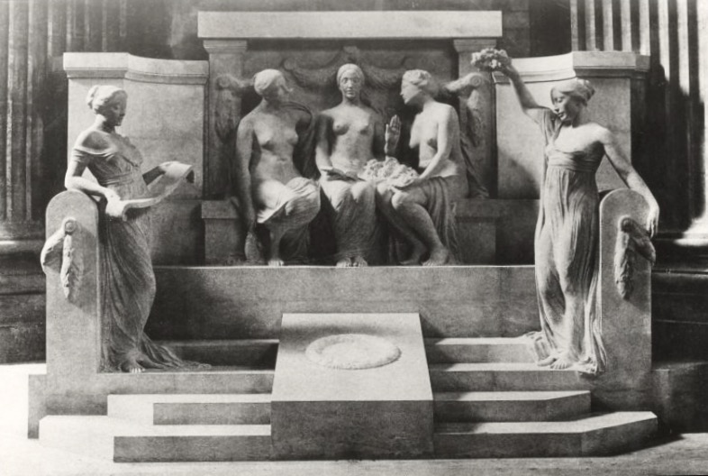 Détail de la tombe de Jean-Jacques Rousseau au Panthéon